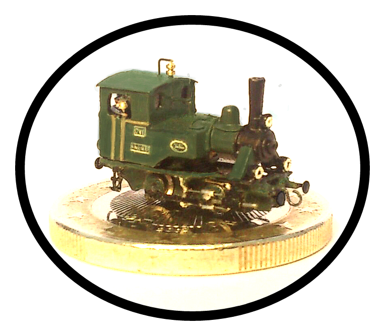 T Gauge Model Steam Locomotive on a 1 euro coin